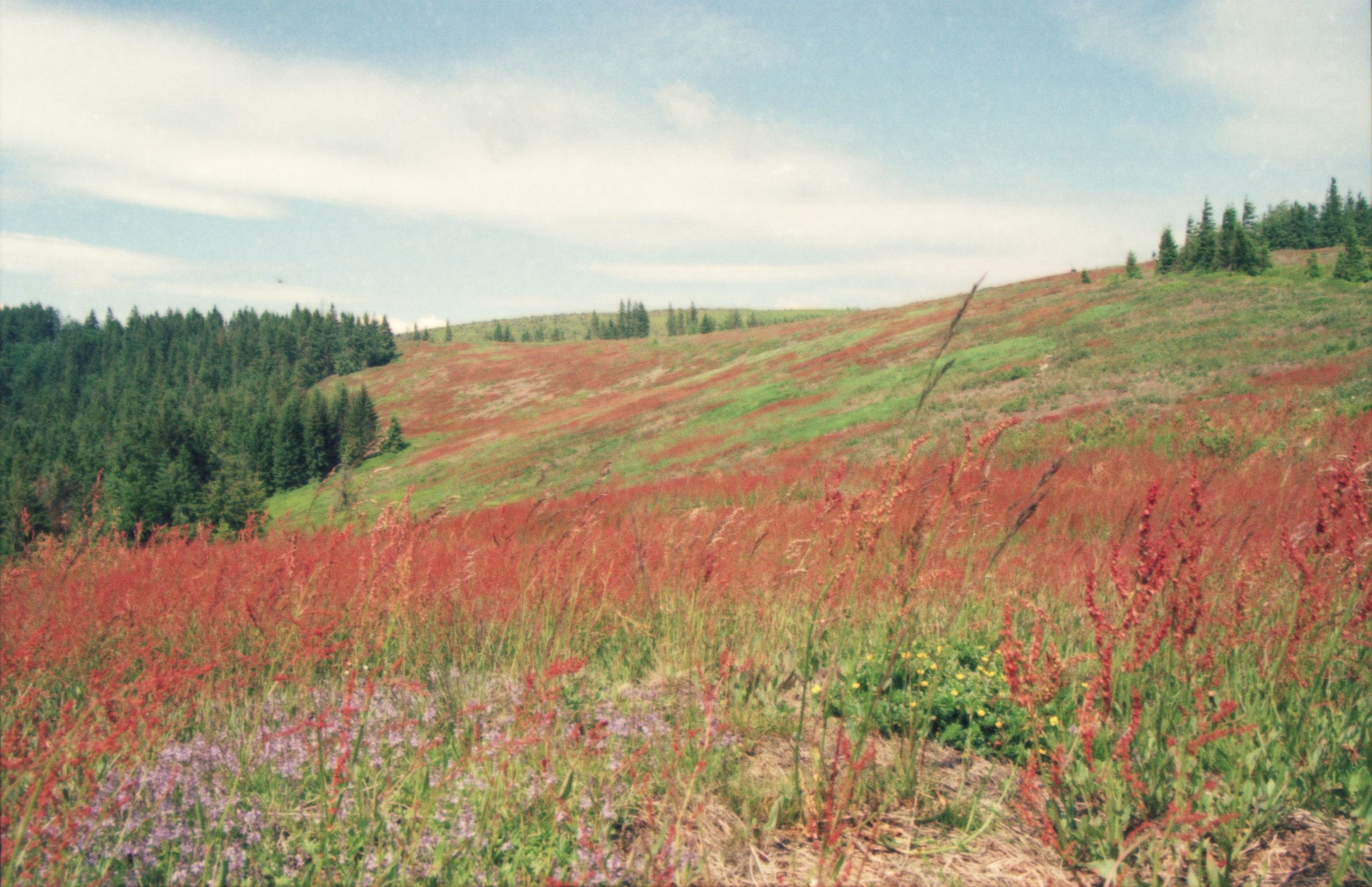 Hala Radziechowska w okresie kwitnienia traw. Rok 2004, aparat analogowy (kopia cyfrowa ze skanera).